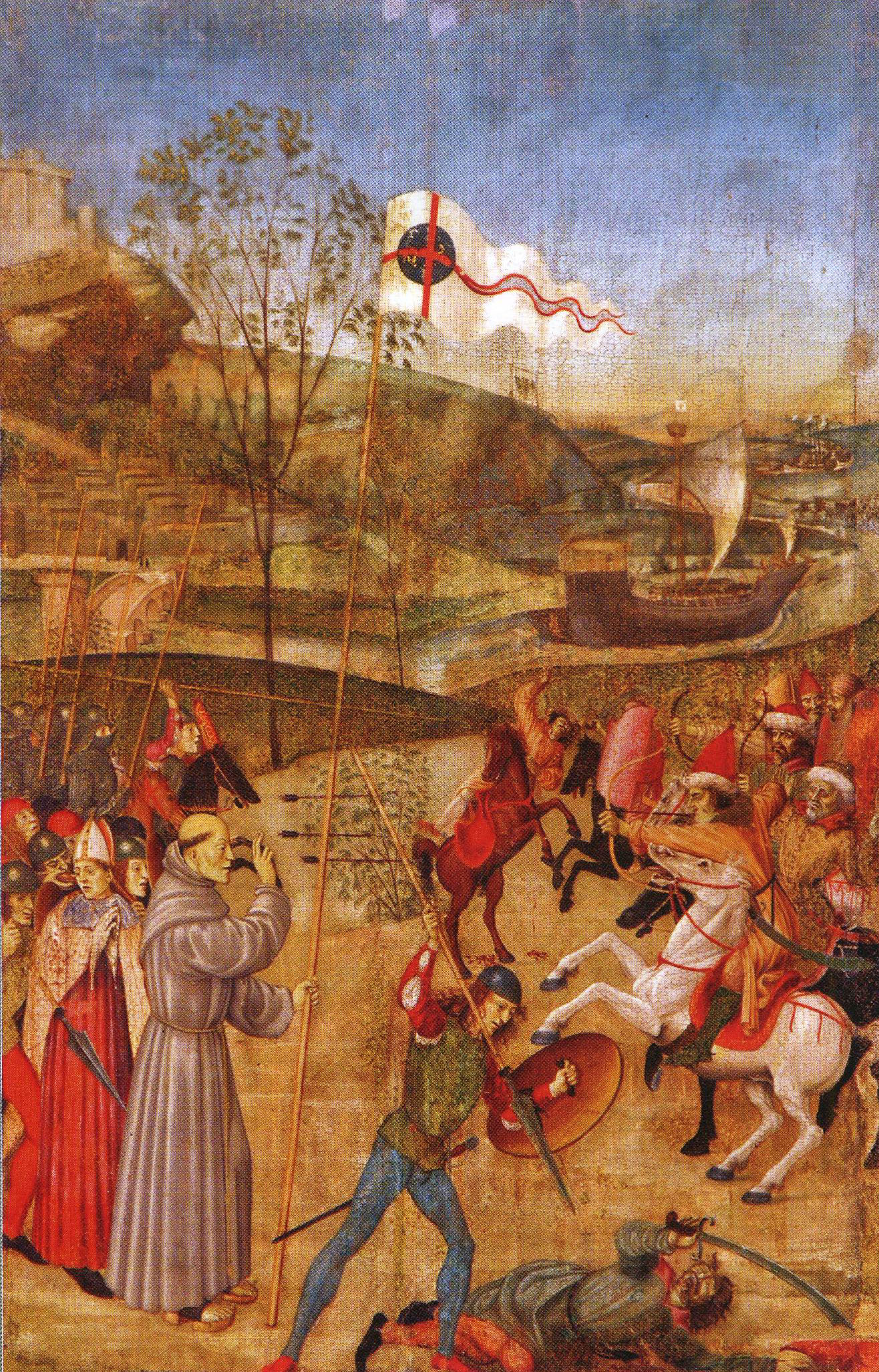 Kapisztrán Szent János a nándorfehérvári csatában